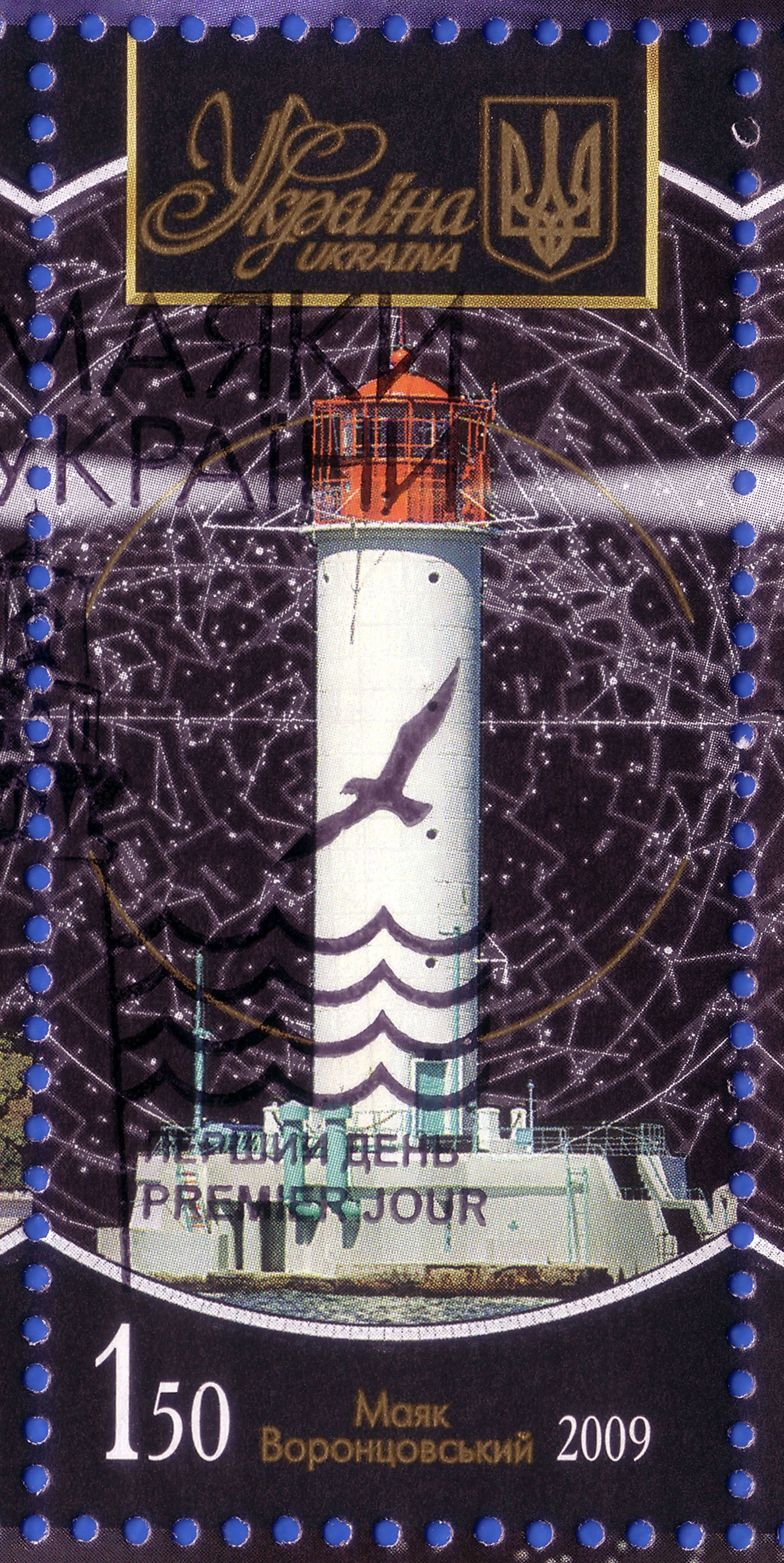 Воронцовский маяк (Одесса). Почтовая марка из блока из 6 марок "Маяки". Гашение первого дня. Укрпочта, 2009.